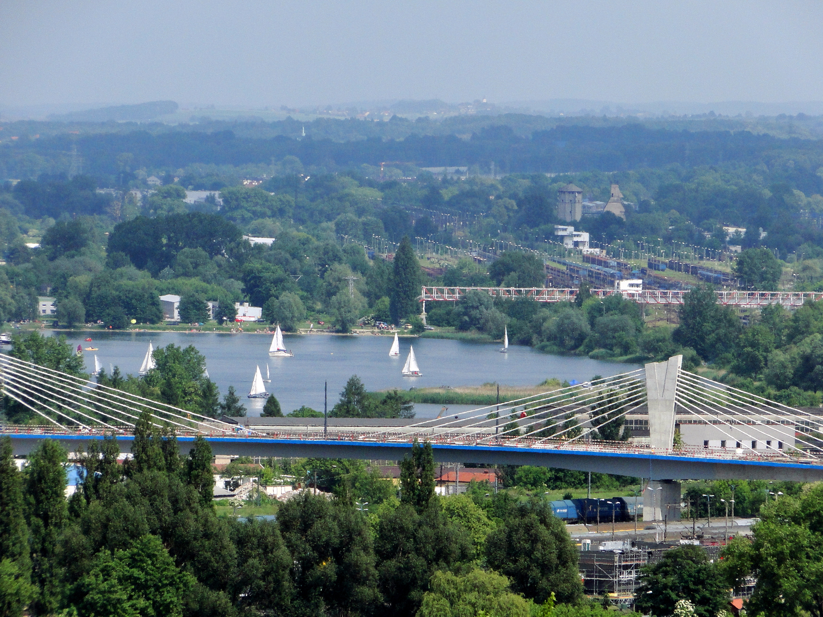 Estakada Wielicka-Lipska i Zalew Bagry, 2015